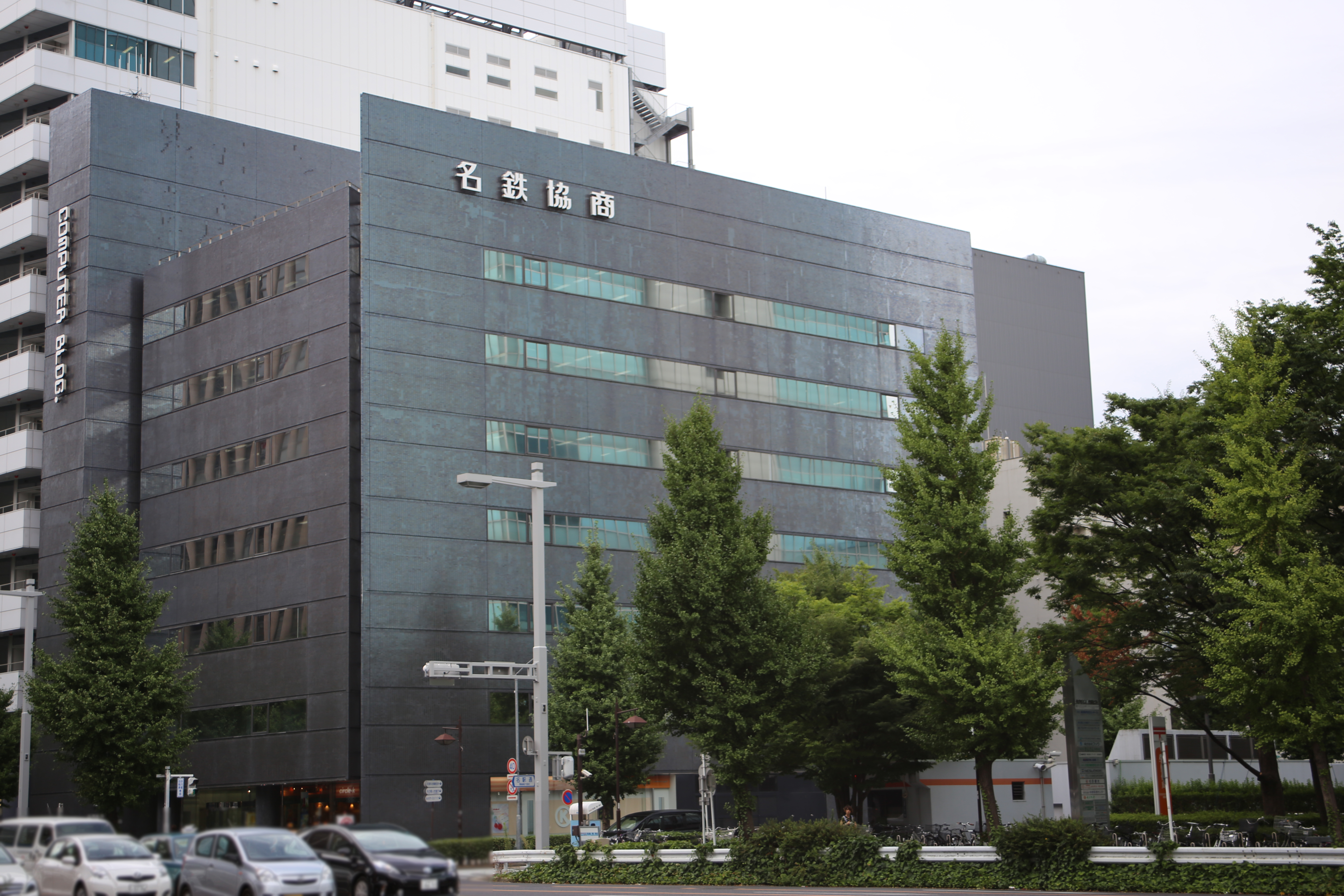 名駅南一丁目の名鉄協商コンピュータビルを西側公道南側より撮影